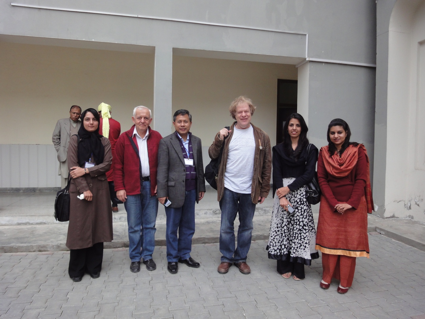 La Abdus Salam School of Mathematical Sciences din Lahore, Pakistan, cu ocazia unei conferinţe internaţionale, martie 2011. Cu prof. Janos Pach, de la ETH Zurich şi Courant Institute din New York, prof. Edy T. Baskoro, de la Institutul Tehnologic din Bandung, Indonezia şi 3 doctorande.